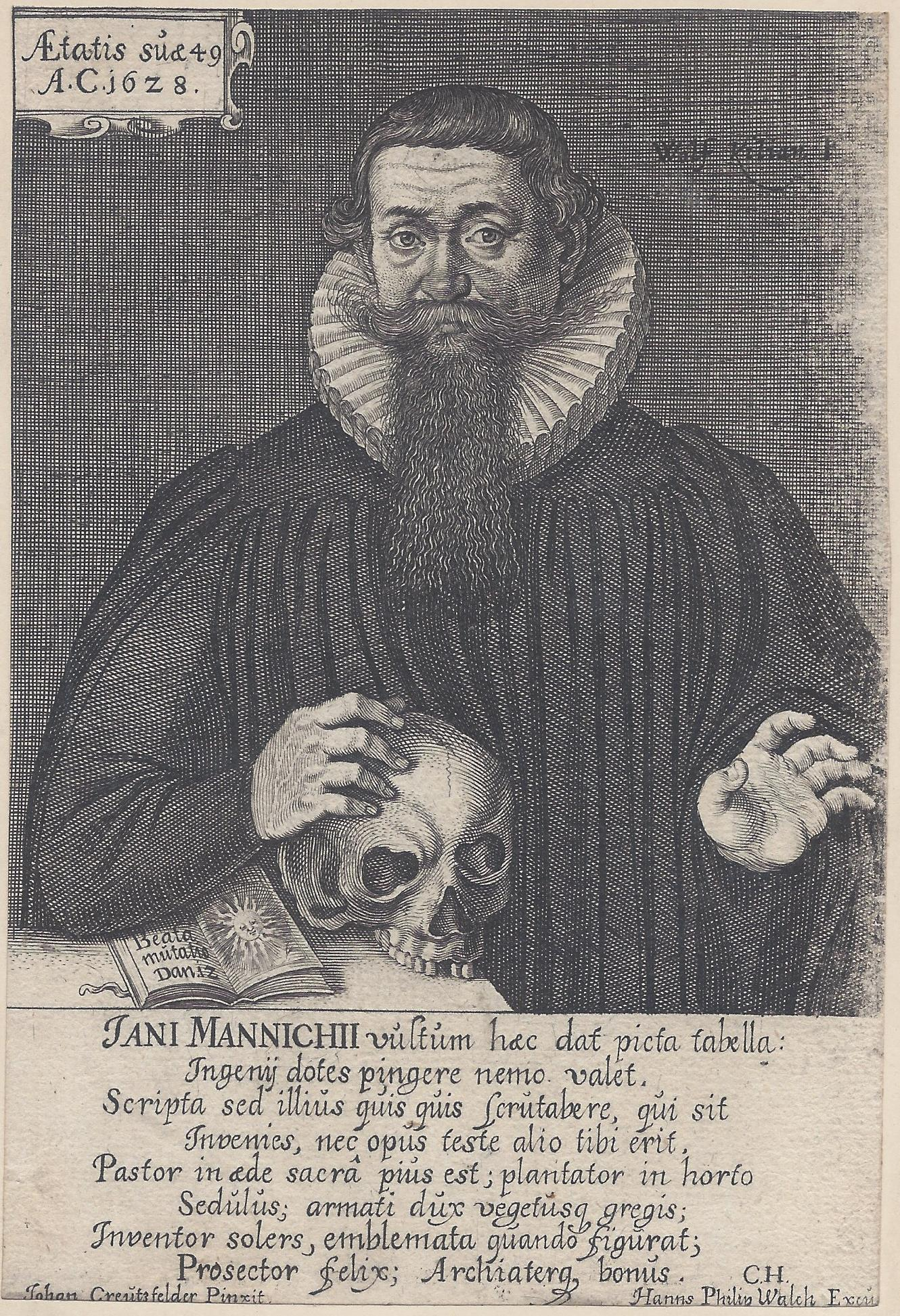 Wolfgang Kilian: Porträt des Nürnberger Predigers Johann Mannich, Kupferstich, 1628.